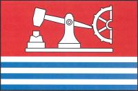 vlajka Hamr